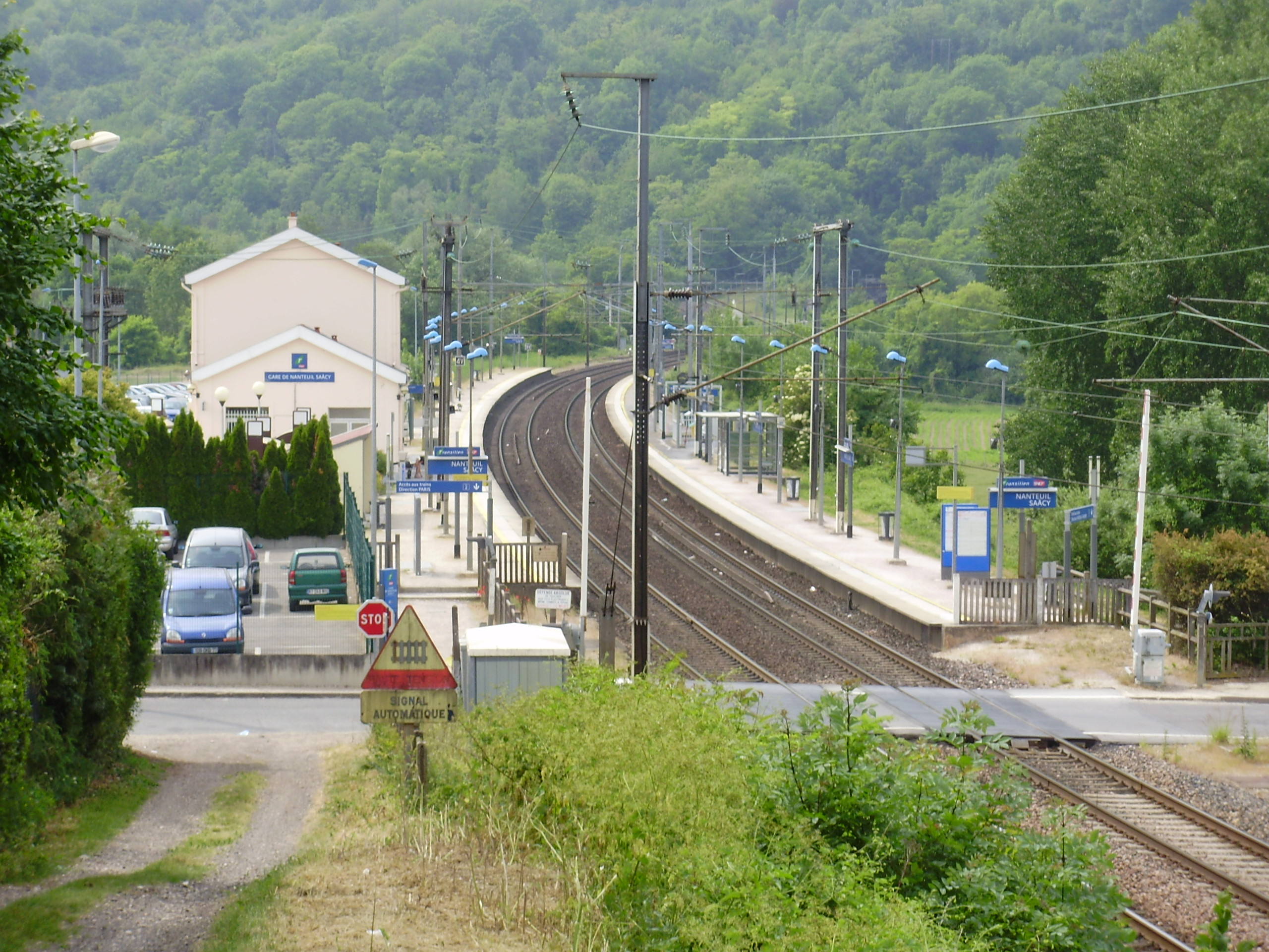 Gare de Nanteuil - Saâcy, à Saâcy-sur-Marne, Seine-et-Marne, France : vue d'ensemble de la gare depuis le « chemin Vert » venant de la commune de Citry, à l'est de Saâcy-sur-Marne